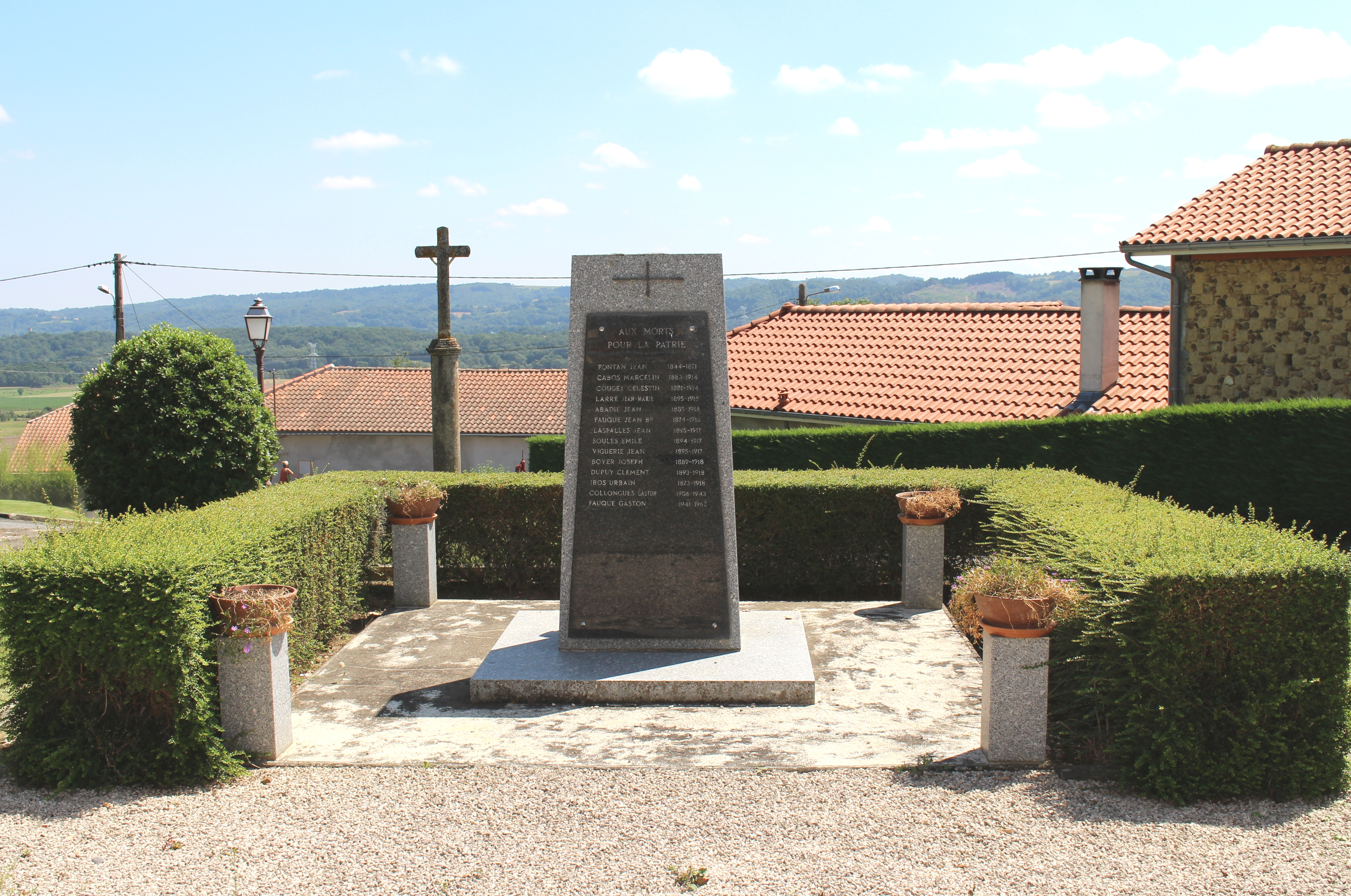 Monument aux morts de Libaros (Hautes-Pyrénées)